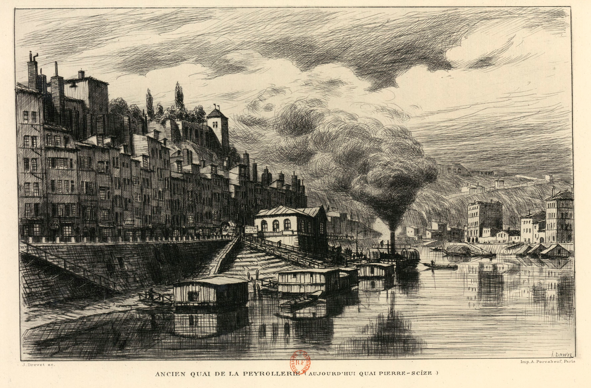 « Ancien quai de la Peyrollerie ( aujourd'hui quai Pierre Scize ) ». Dessin par Joannès Drevet (1854-1940), en illustration du livre de Emmanuel Vingtrinier (1850-1931), Le Lyon de nos pères, 1901 (illustré de 20 eaux-fortes et de 300 dessins à la plume et au crayon par J. Drevet), p. 282. Le quai de la Peyrollerie est un ancien quai de Lyon en rive droite de la Saône dans le quartier Saint-Jean. Il prolongeait le quai Bondy vers l'amont. Il a été absorbé par le quai Pierre-Scize.